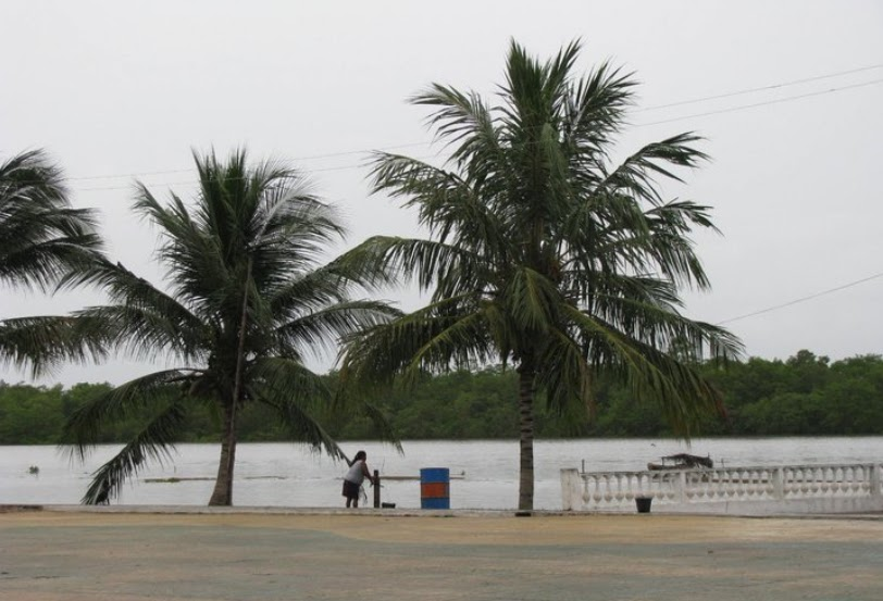 Rio Periá na altura da sede do Município de Primeira Cruz